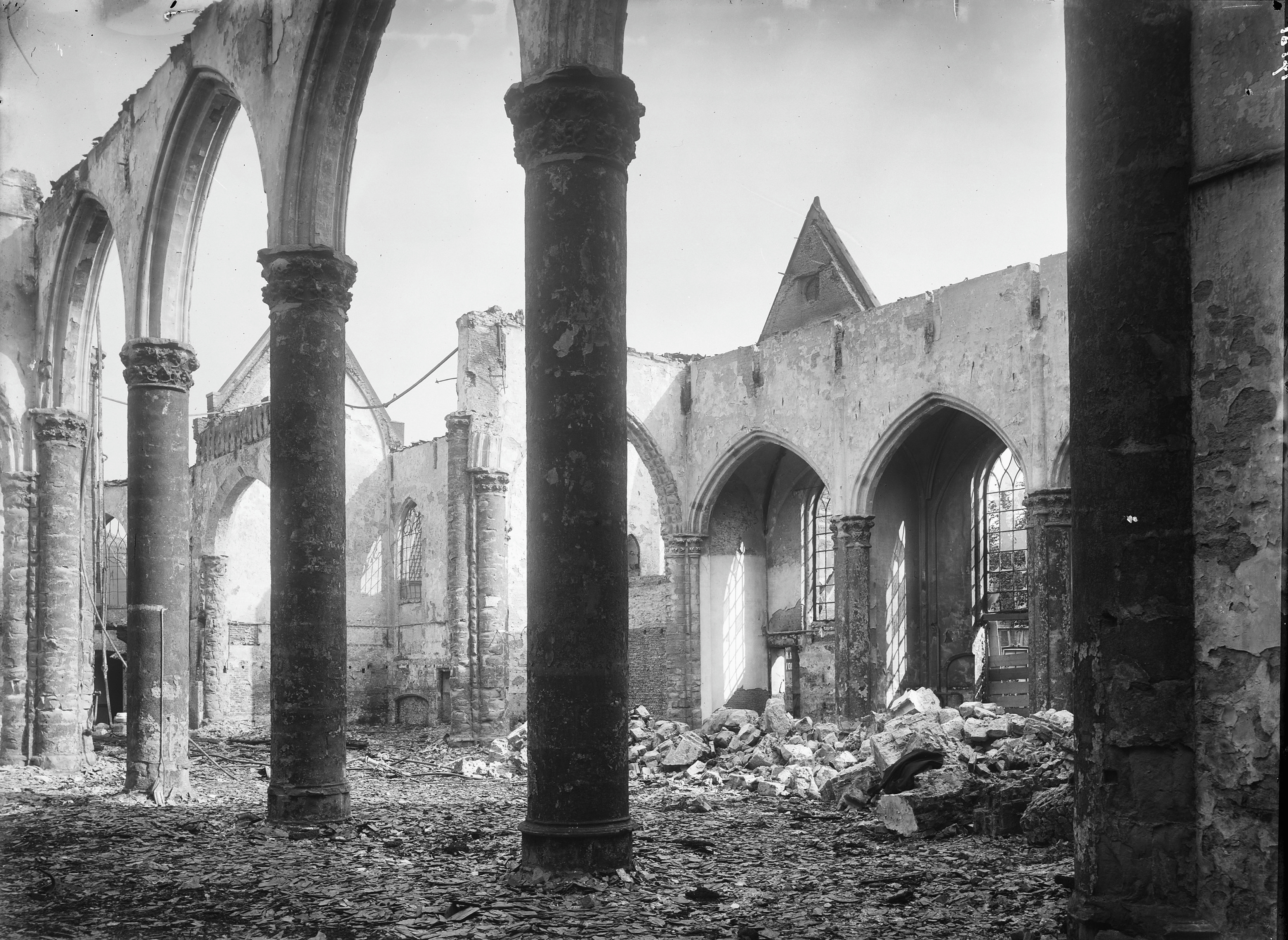 Grote of Sint-Jacobskerk: kerk en toren na de brand, inwendig